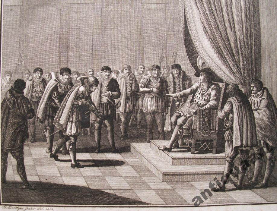 Przemysław II przejmuje dziedzictwo po swoim bracie nad połową Głogowa i Ścinawy w roku 1460